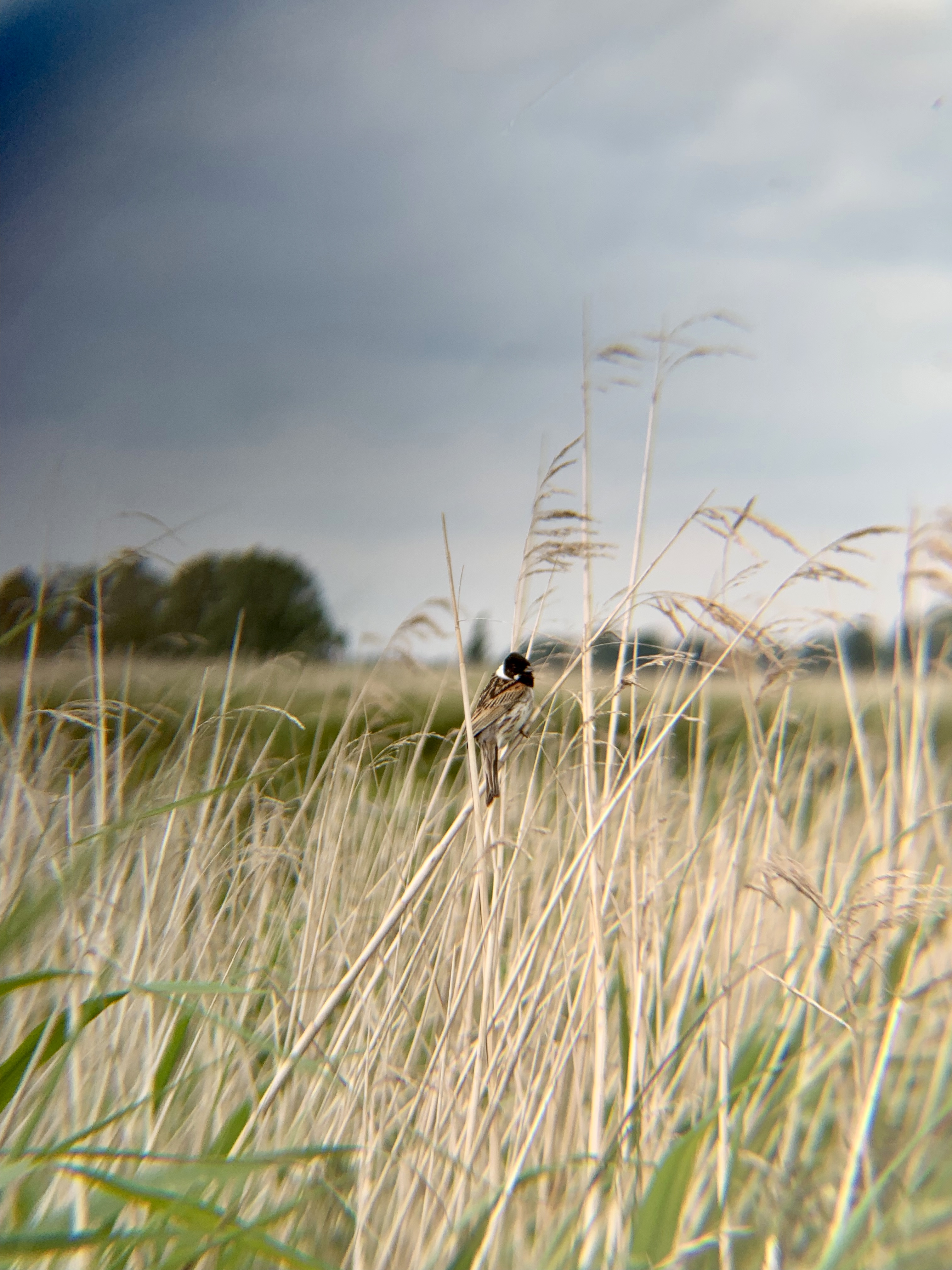 vogeltje